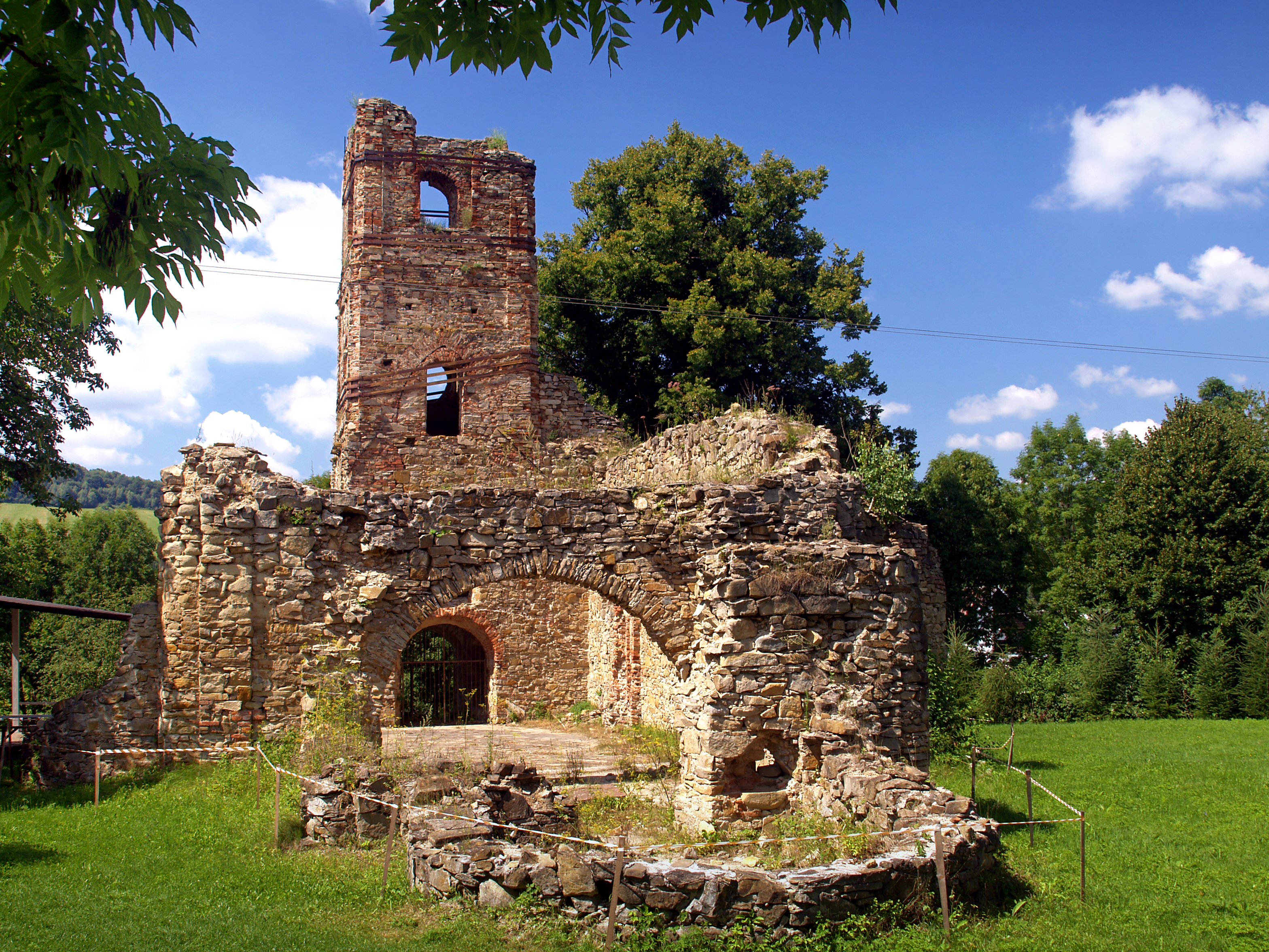 Krásny Brod, Prešov (Slovaquie) - Ruines du monastère basilien de la Descente de l'Esprit saint du IXe siècle.